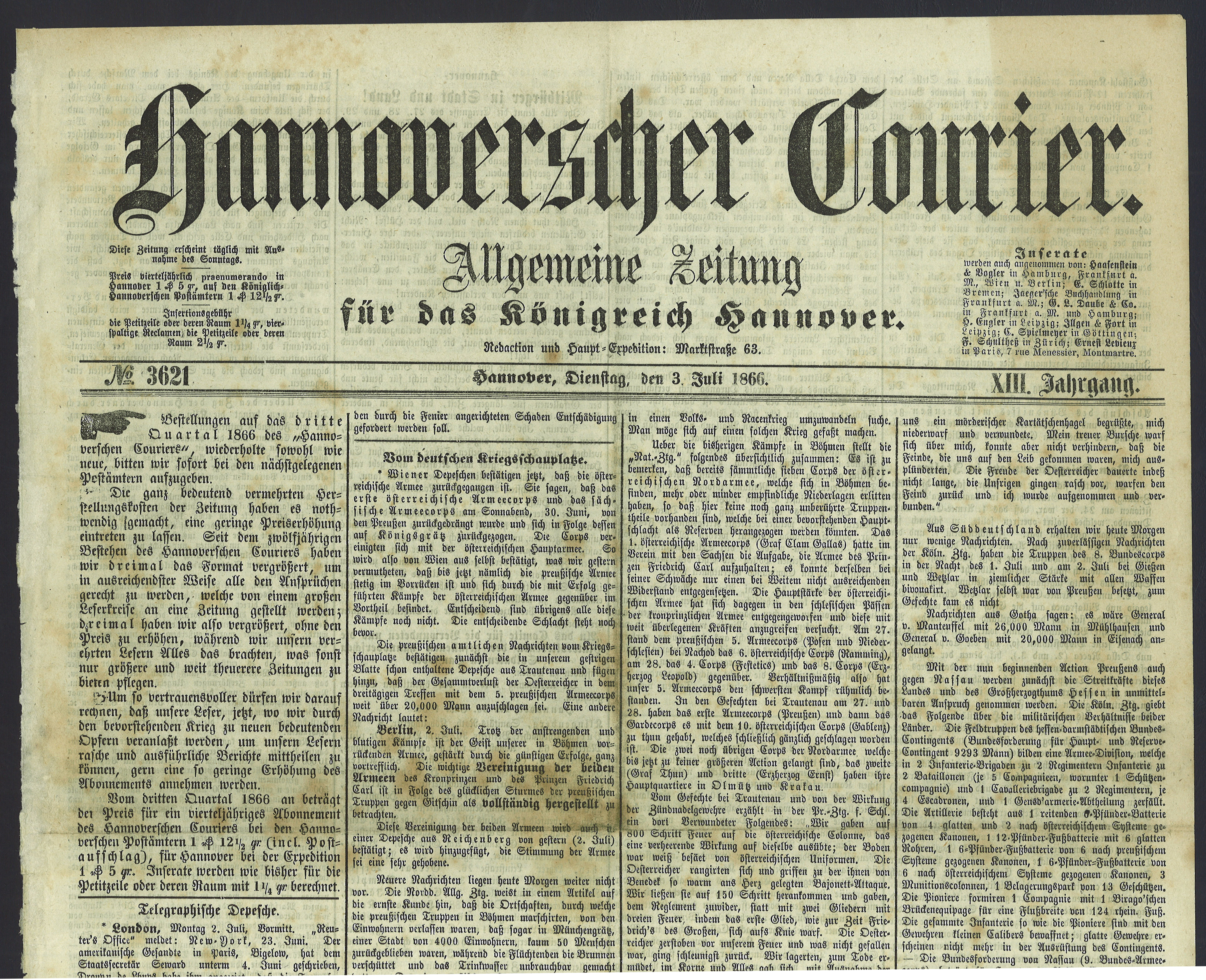 Hannoverscher Courier. Allgemeine Zeitung für das Königreich Hannover. Redaction und Haupt-Expedition: Marktstraße 63 No. 3621, Hannover, Dienstag, den 3. Juli 1866, XIII. Jahrgang Seite mit den Maßen ca. DIN A2, oberer Teil